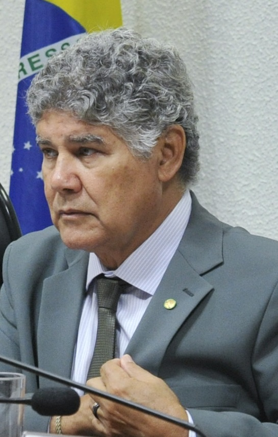 Sala de comissões do Senado durante Comissão de Direitos Humanos e Legislação Participativa (CDH).CDH realiza audiência pública para rememorar os 51 anos do golpe civil e militar de 1964, que interrompeu o estado democrático de direito no Brasil com a deposição pelas armas do Presidente legalmente constituído João Belchior Marques Goulart.Mesa (E/D):professora da Fundação Getúlio Vargas, Dulce Pandolfi;coordenadora do Grupo Independente de Familiares dos Mortos e Desaparecidos, Eliana Castro;jornalista e escritor, Cid de Queiroz Benjamin;vice- presidente da CDH, senador João Capiberibe (PSB-AP);deputado Federal Chico Alencar (PSOL-RJ).Foto: Geraldo Magela/Agência Senado